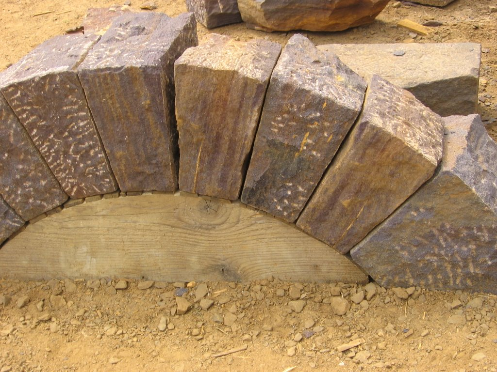 Construction d'un arc en pierre Guédelon